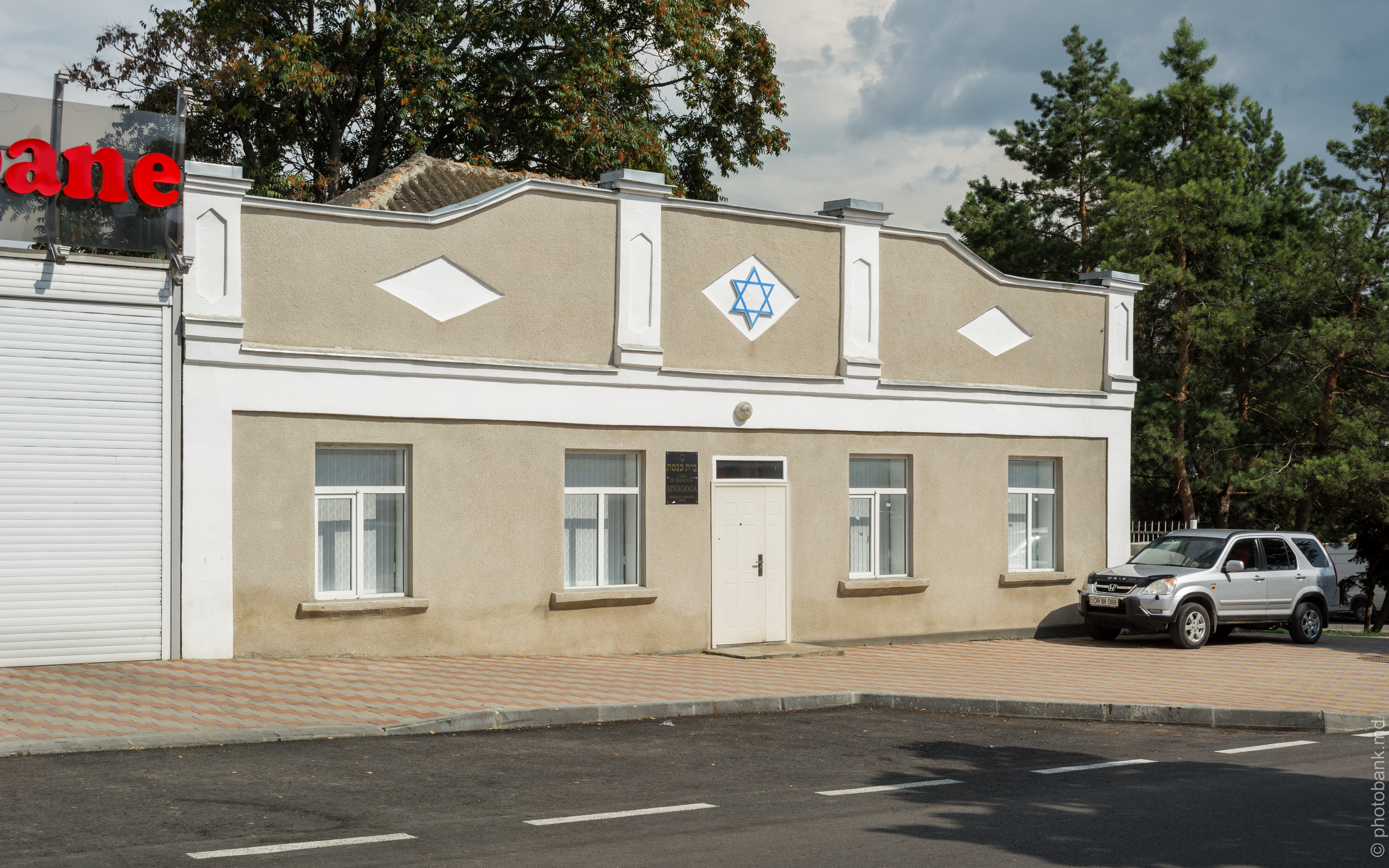 Оргеев, ул. Василе Лупу 62